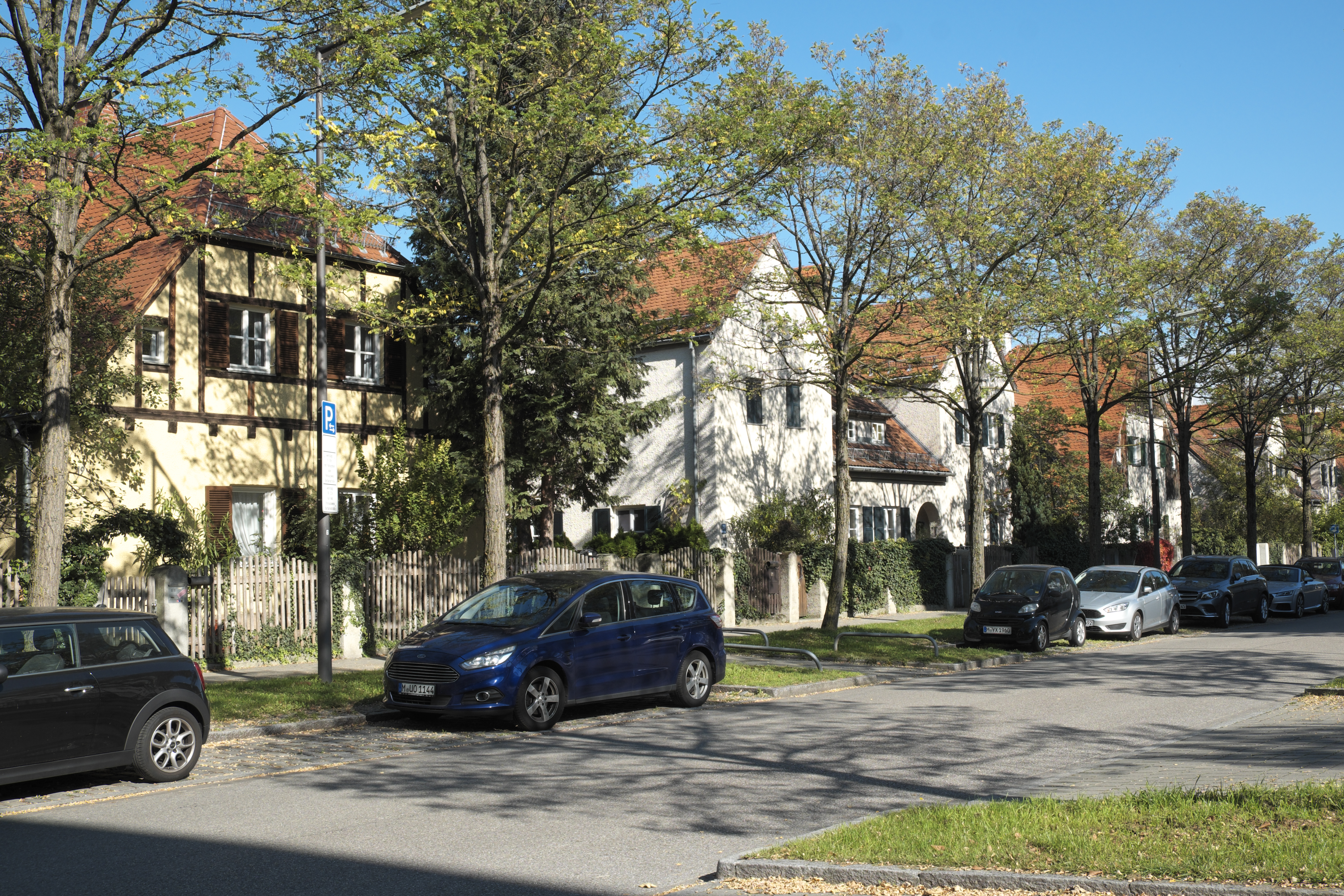 Barbarasiedlung im Stadtbezirk Schwabing-West in München (Bayern/Deutschland)